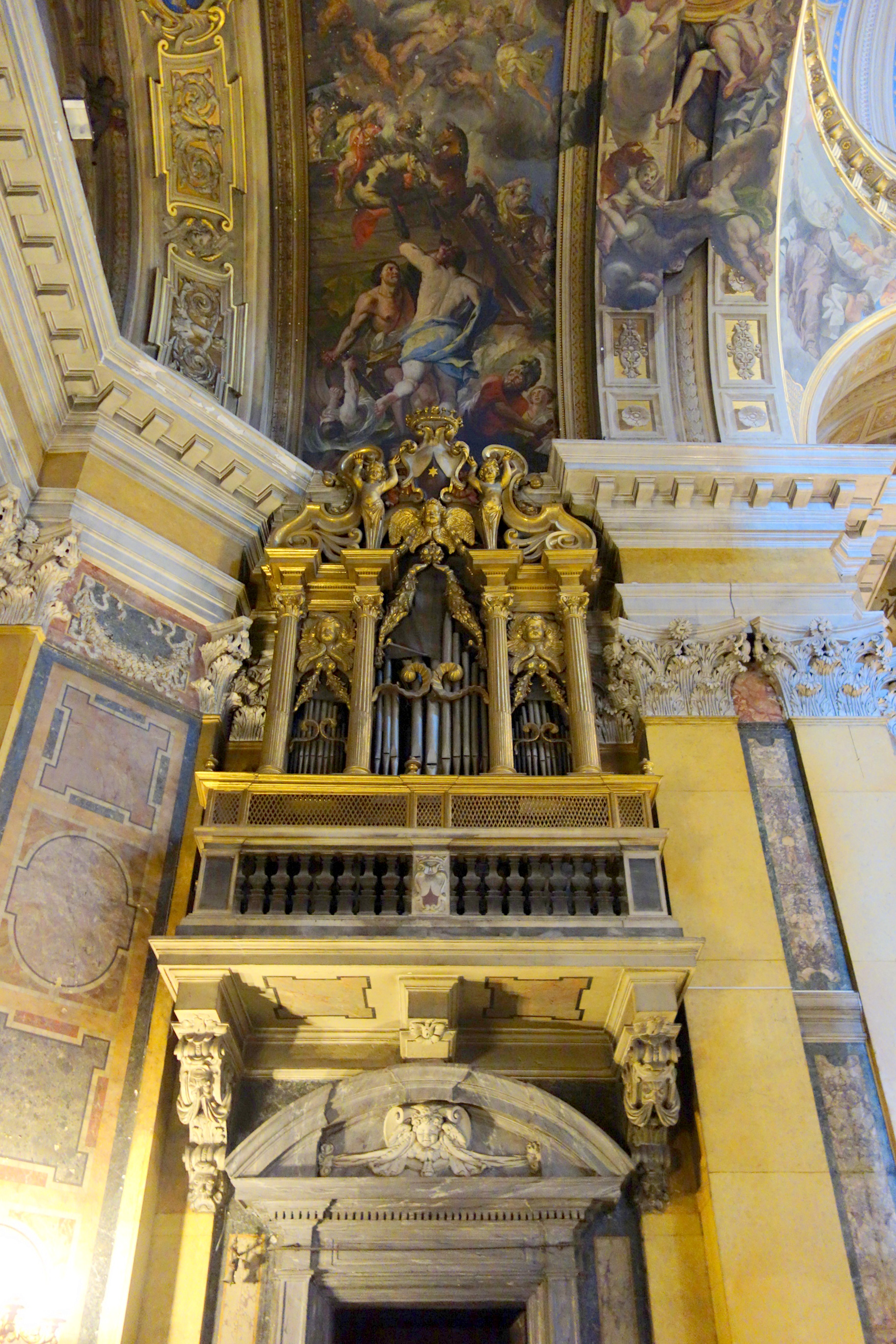 Orgel Santa Maria in Traspontina, Rom, Italien